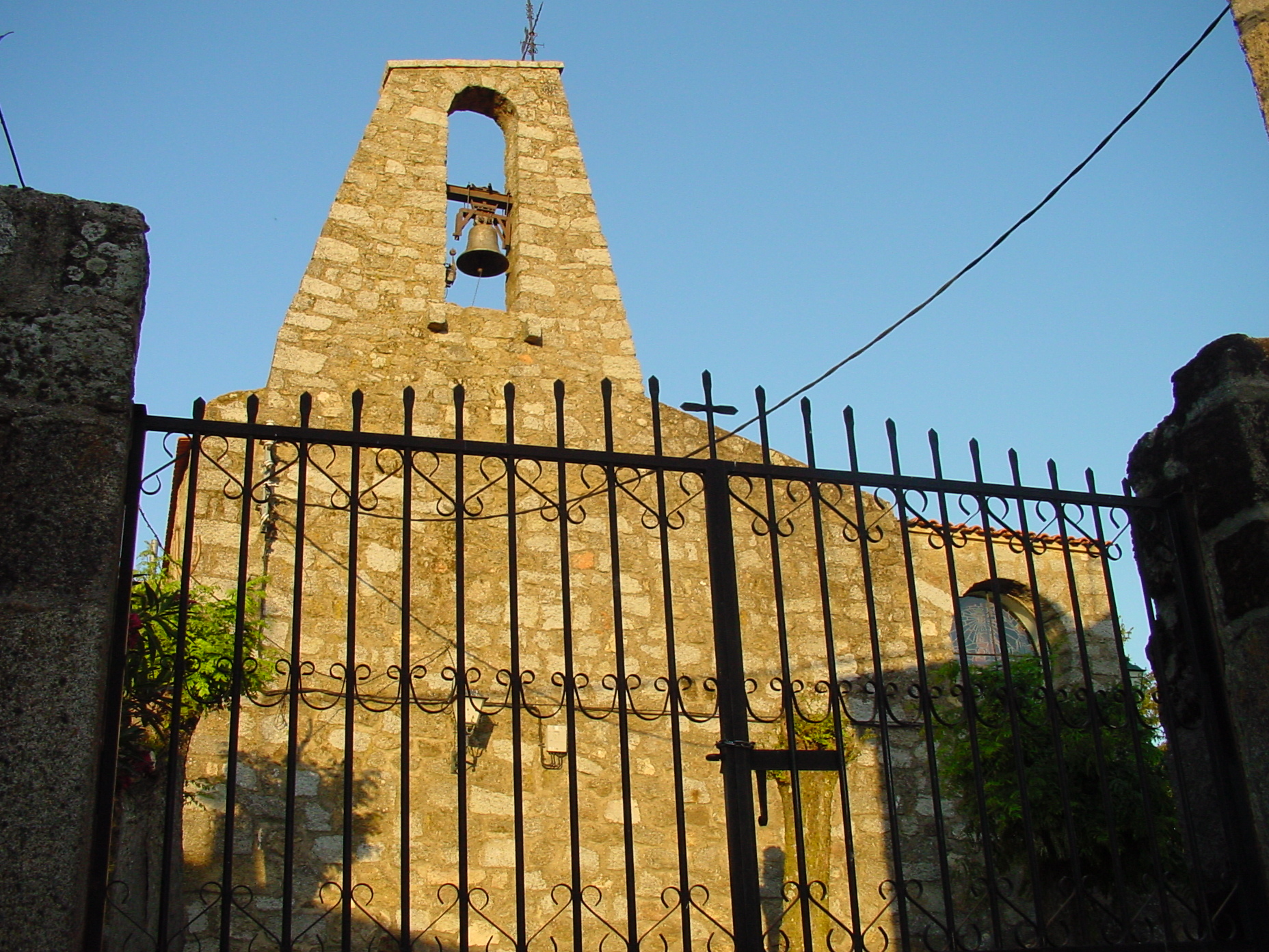 Vista de campanario de iglesia en Rozas de Puerto Real.